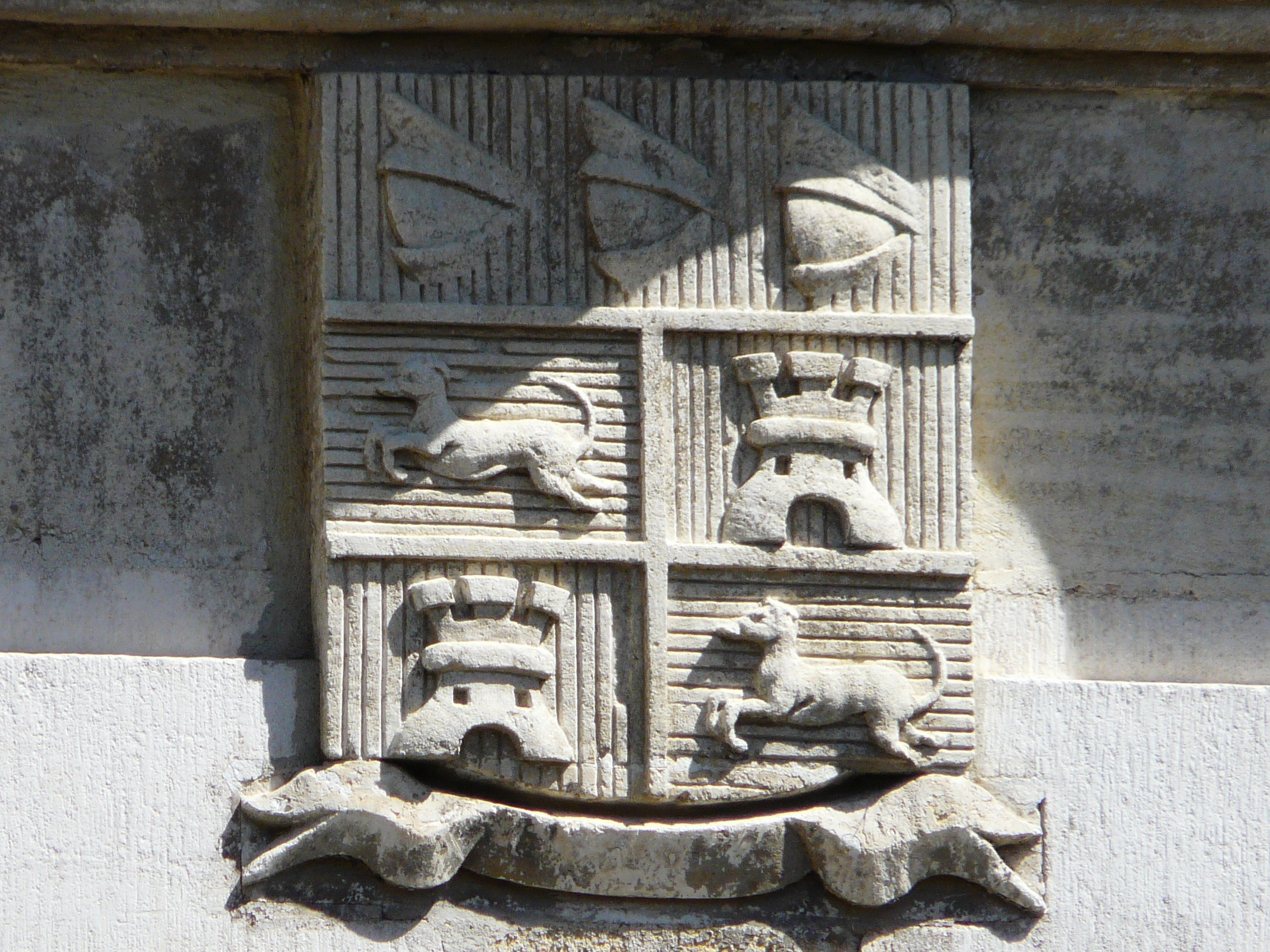 Armoiries au centre de la façade ouest, château de Vaucocour, Thiviers, Dordogne, France